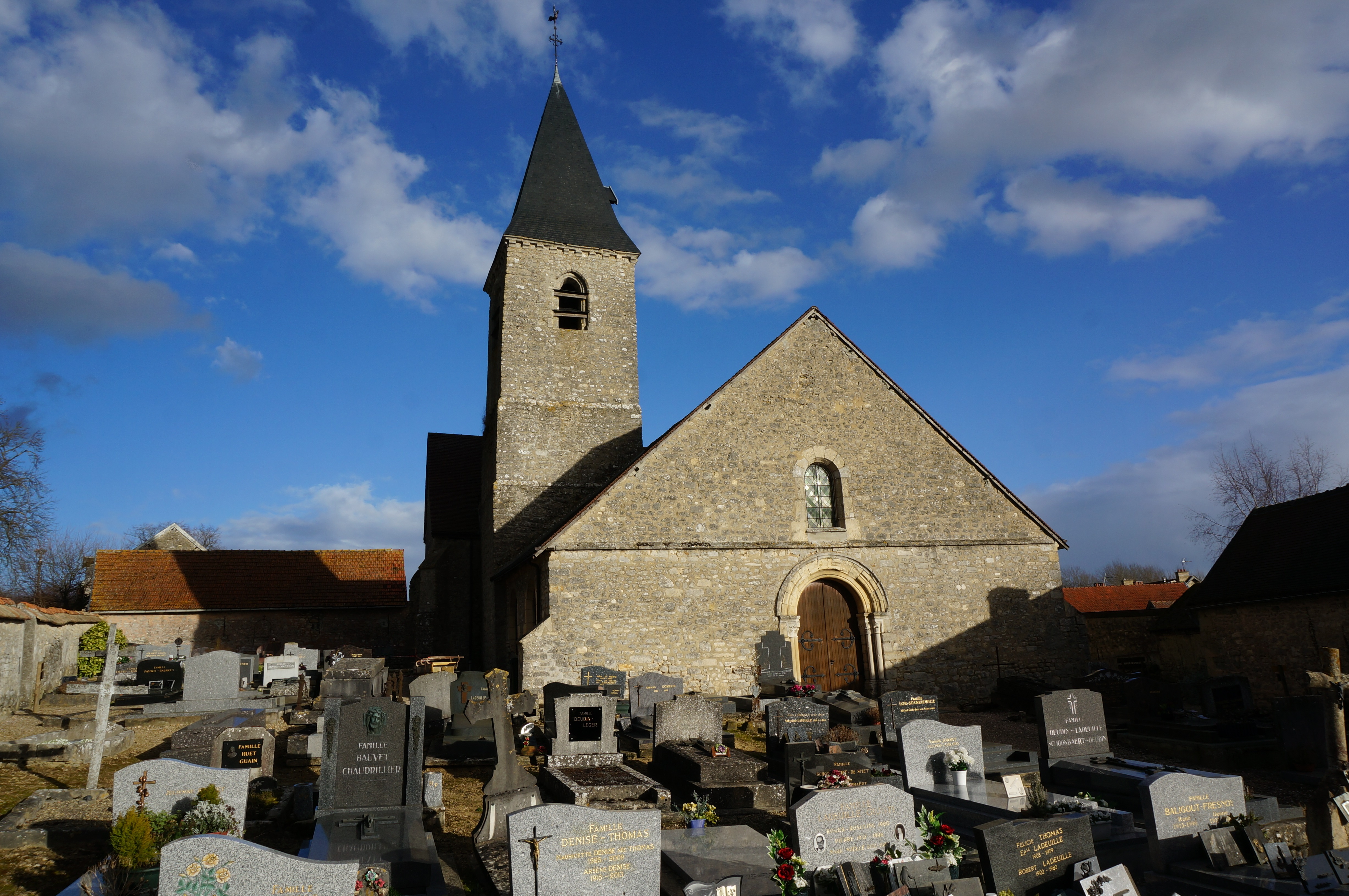 Vues de Bouvancourt.